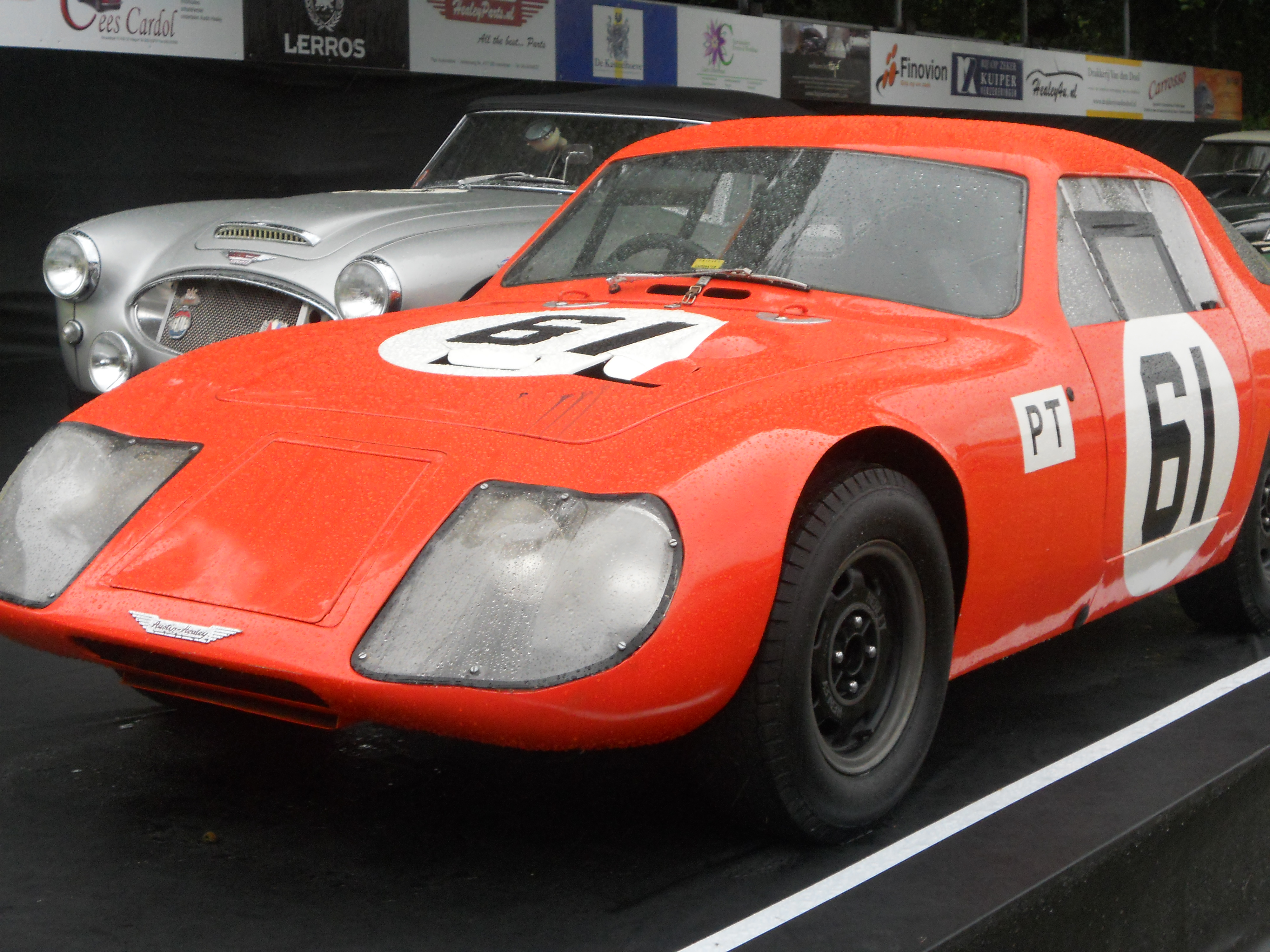 Concours d'Elegance 2012